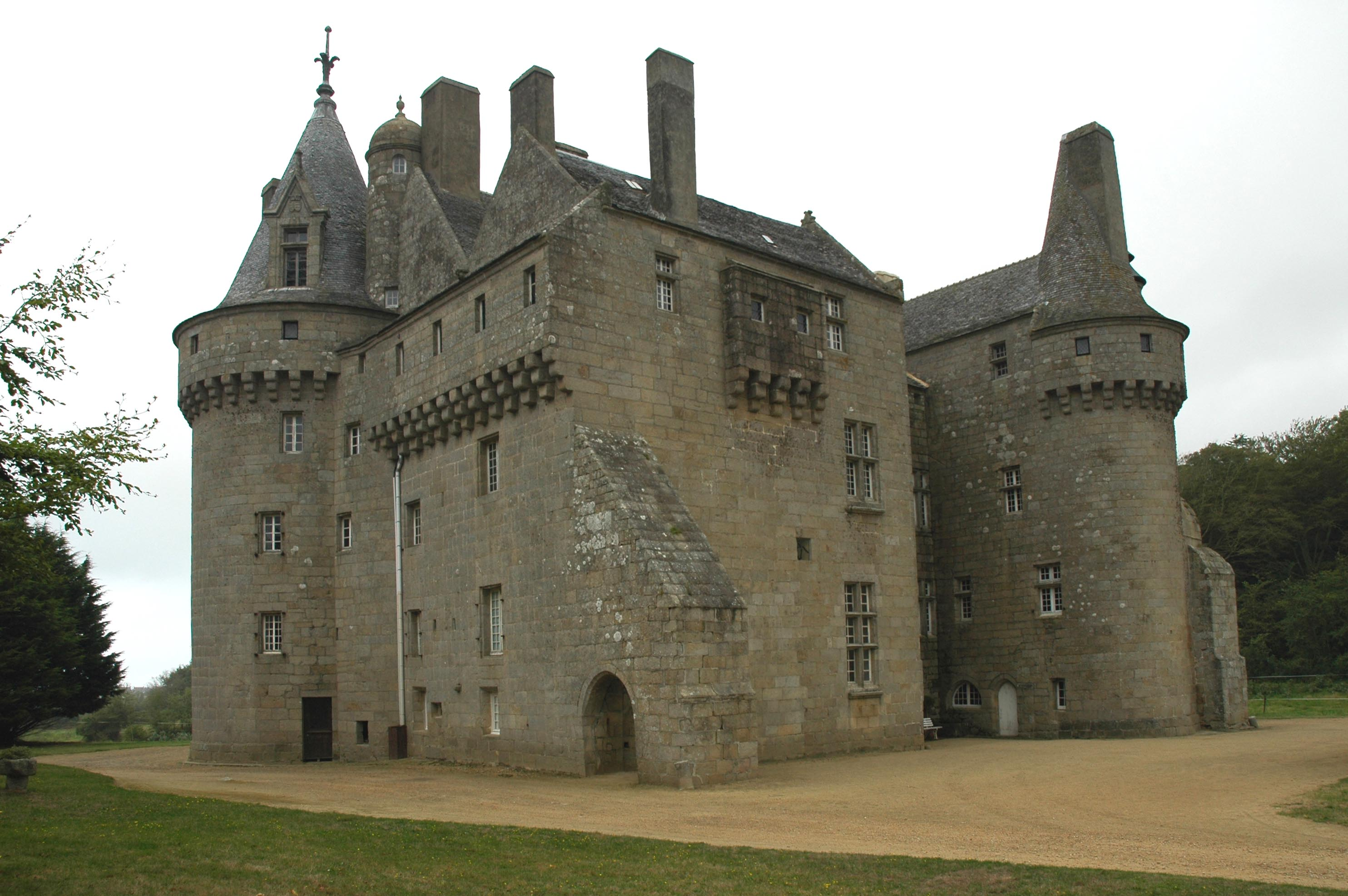 Le château de Kérouzéré, à Sibiril dans le Finistère (France).